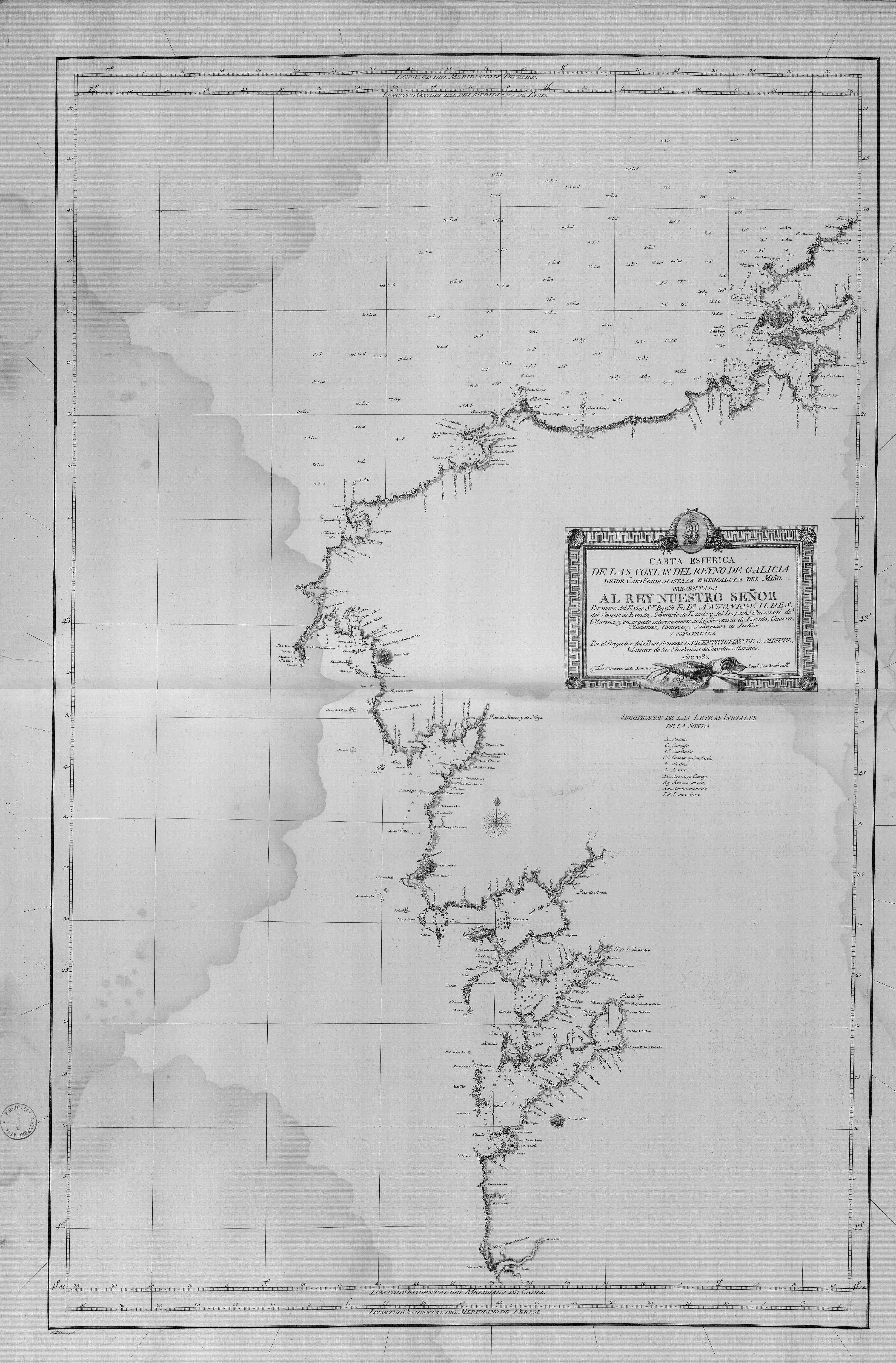 Carta esferica de las costas del Reyno de Galicia, desde Cabo Prior, hasta la embocadura del Miño / por ... Antonio Valdés ; construida por Vicente Tofiño de S. Miguel ... ; Fern[an]do Selma lo grabó. --[Madrid], 1787. --1 carta naútica : calc. ; 80 x 51,5 cm Datos de publicación tomados del pie de imprenta de la obra y del mapa.. --Cartela adornada en la parte derecha conteniendo el título, responsabilidad y fecha de publicación. -- Costas y relieve por sombreado. -- Sondas. -- Márgenes graduados. -- Orientado con lis. -- Longitud del Meridiano de Tenerife, del Meridiano de París, del Meridiano de Cádiz y del Meridiano del Hierro.. --En: Tofiño de San Miguel, Vicente, (1732-1795). Atlas marítimo de España. Madrid, 1789